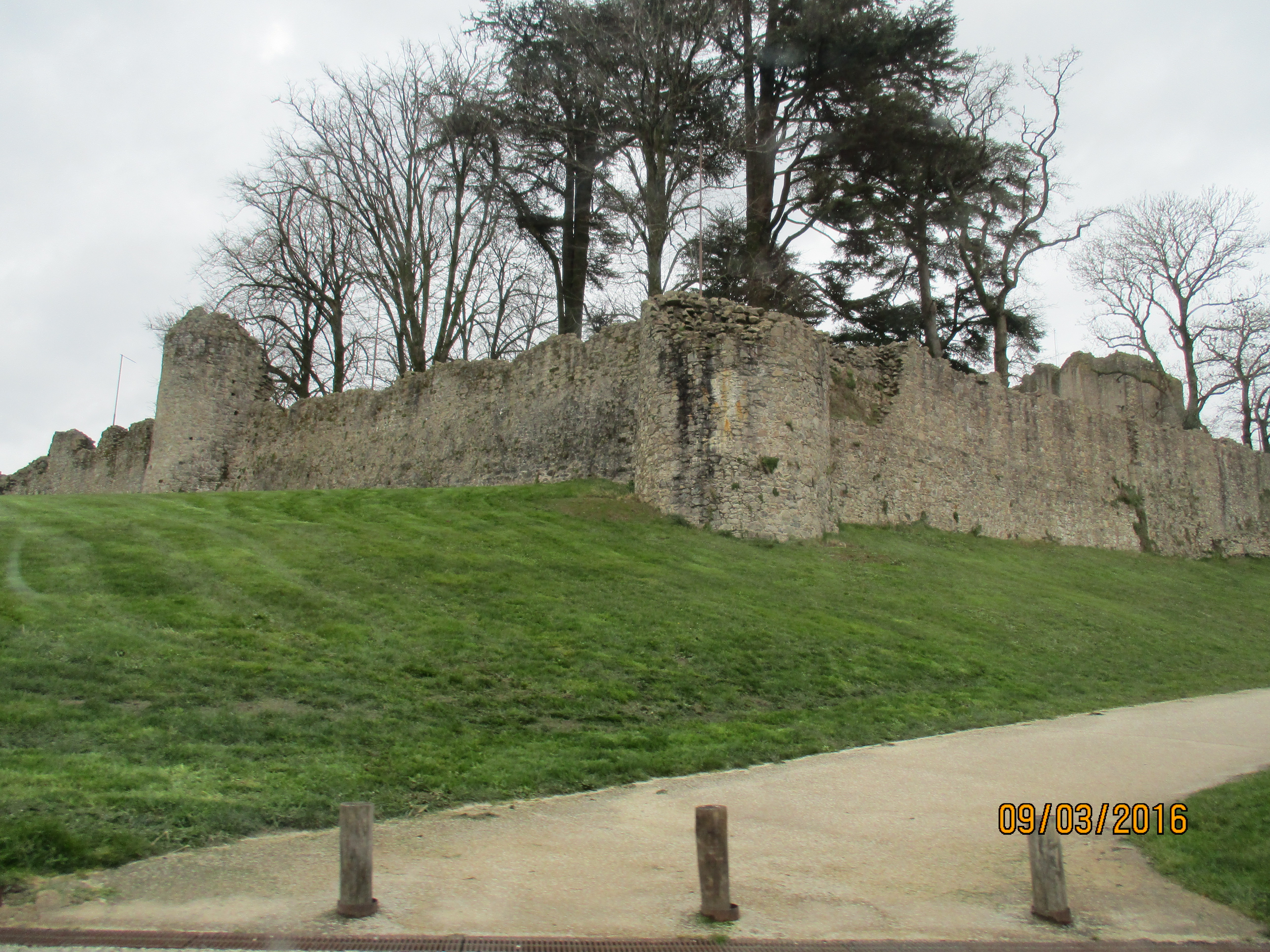 Photographie d'une partie de l'enceinte du château fort de Pouzauges.